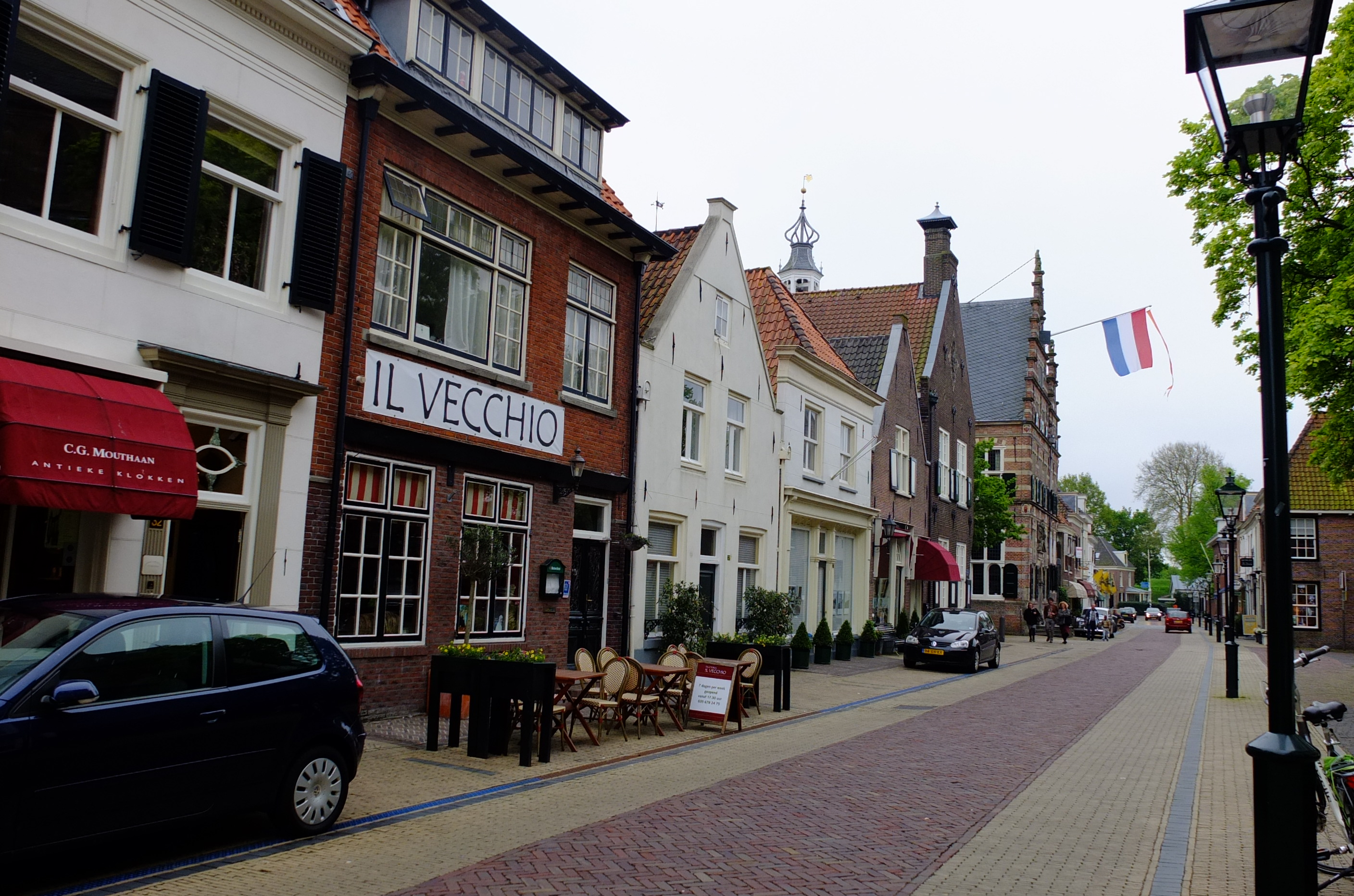 Naarden